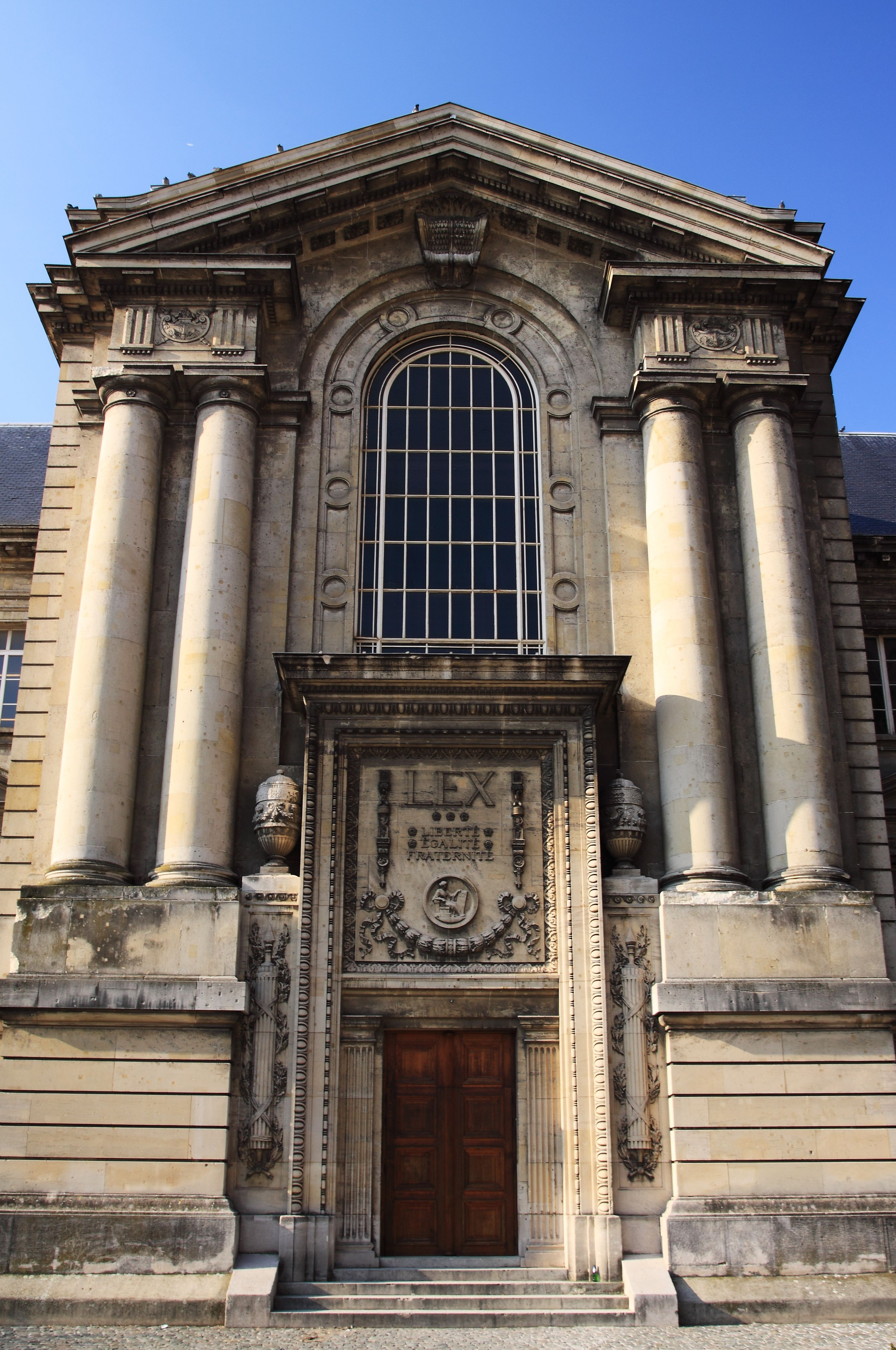 Le Palais de Justice côté parvis — Reims, Champagne-Ardenne, France